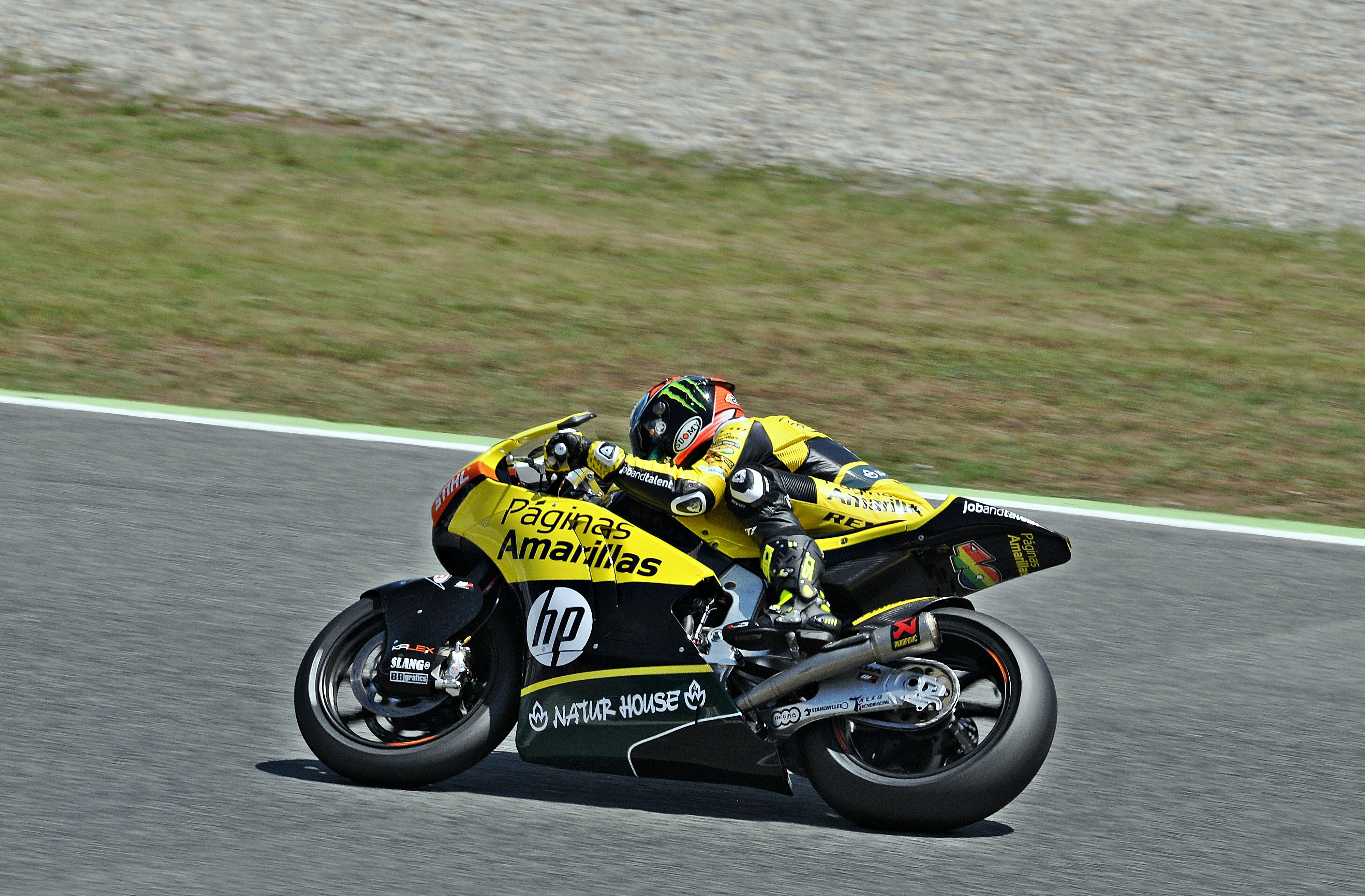 gran premio de cataluña